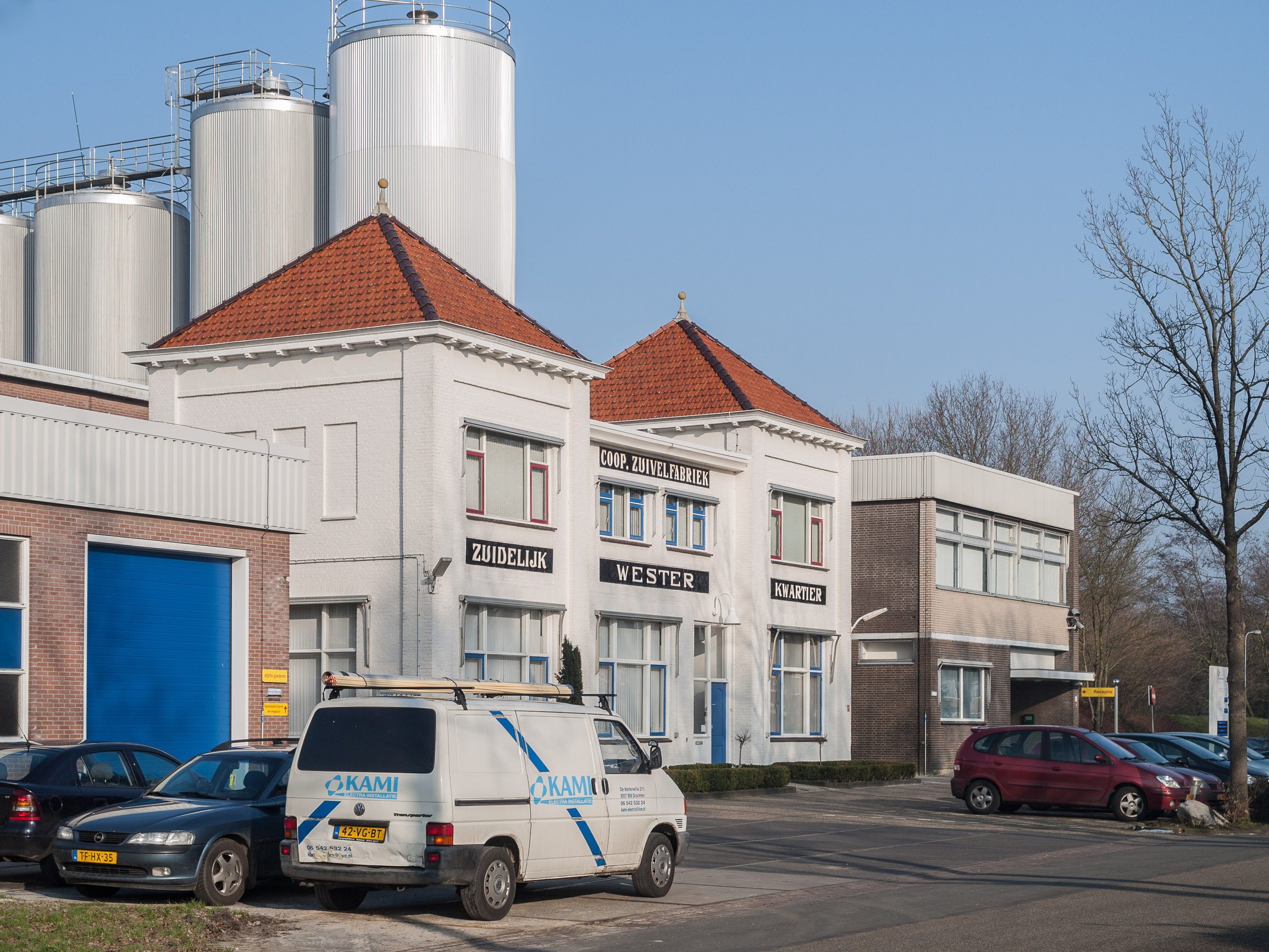 Coöperatieve zuivelfabriek zuidelijk wester kwartier in Marum